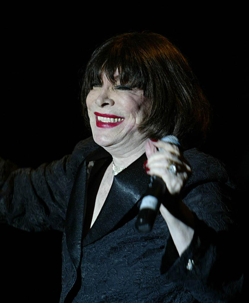 A cantora brasileira Marlene (Vittoria Bonaiutti De Martino). depicted person: Victória Bonaiutti De Martino (age: 79.61)